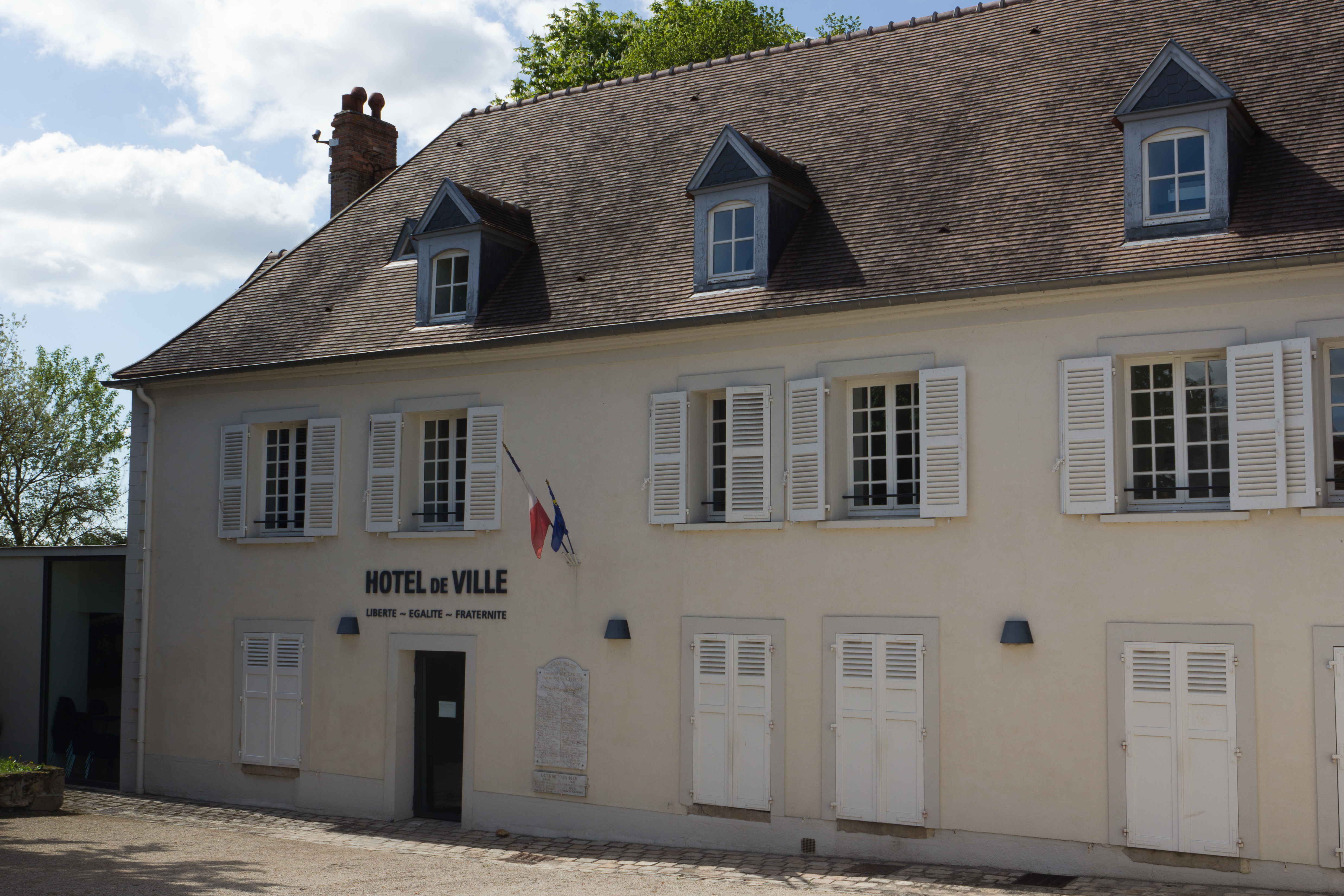 Mairie d'Itteville, Itteville, département de l'Essonne, France.